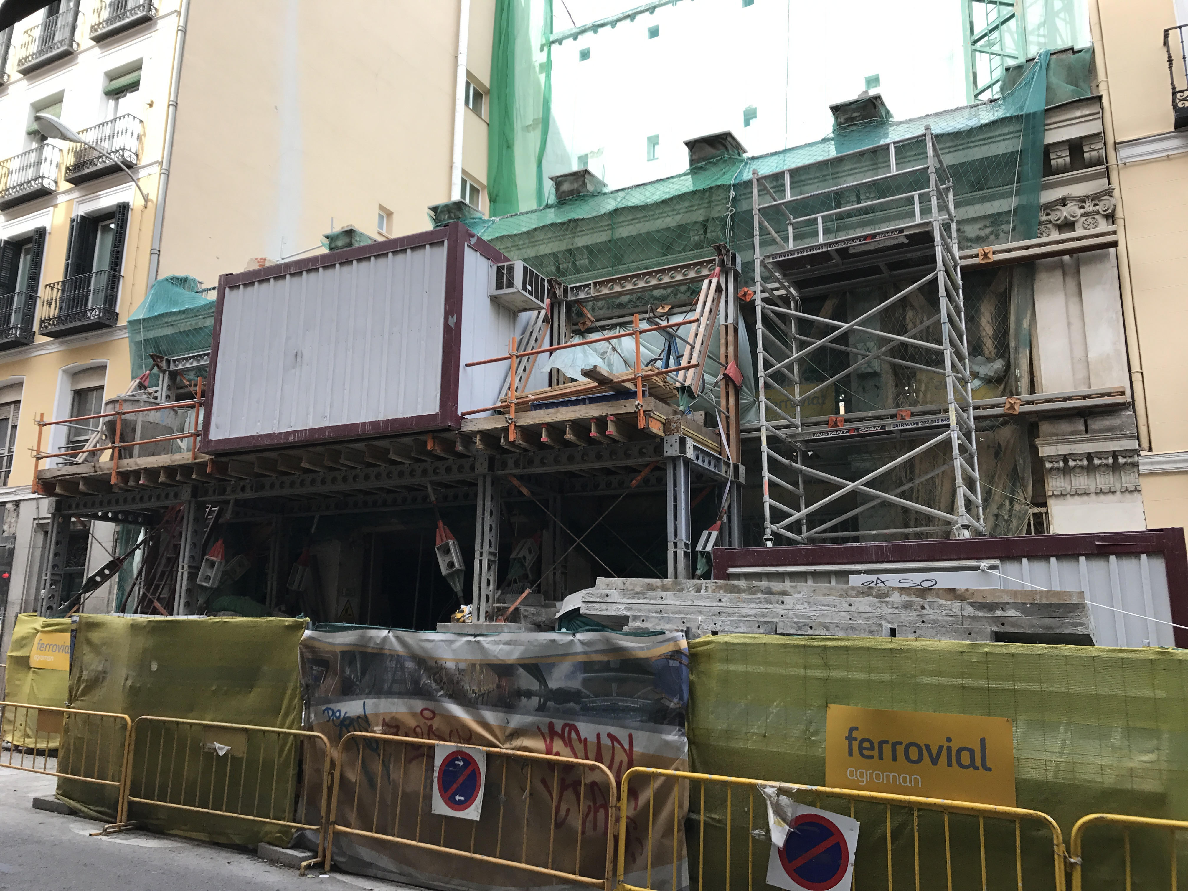 Fernando VI, 3 caseta de obras